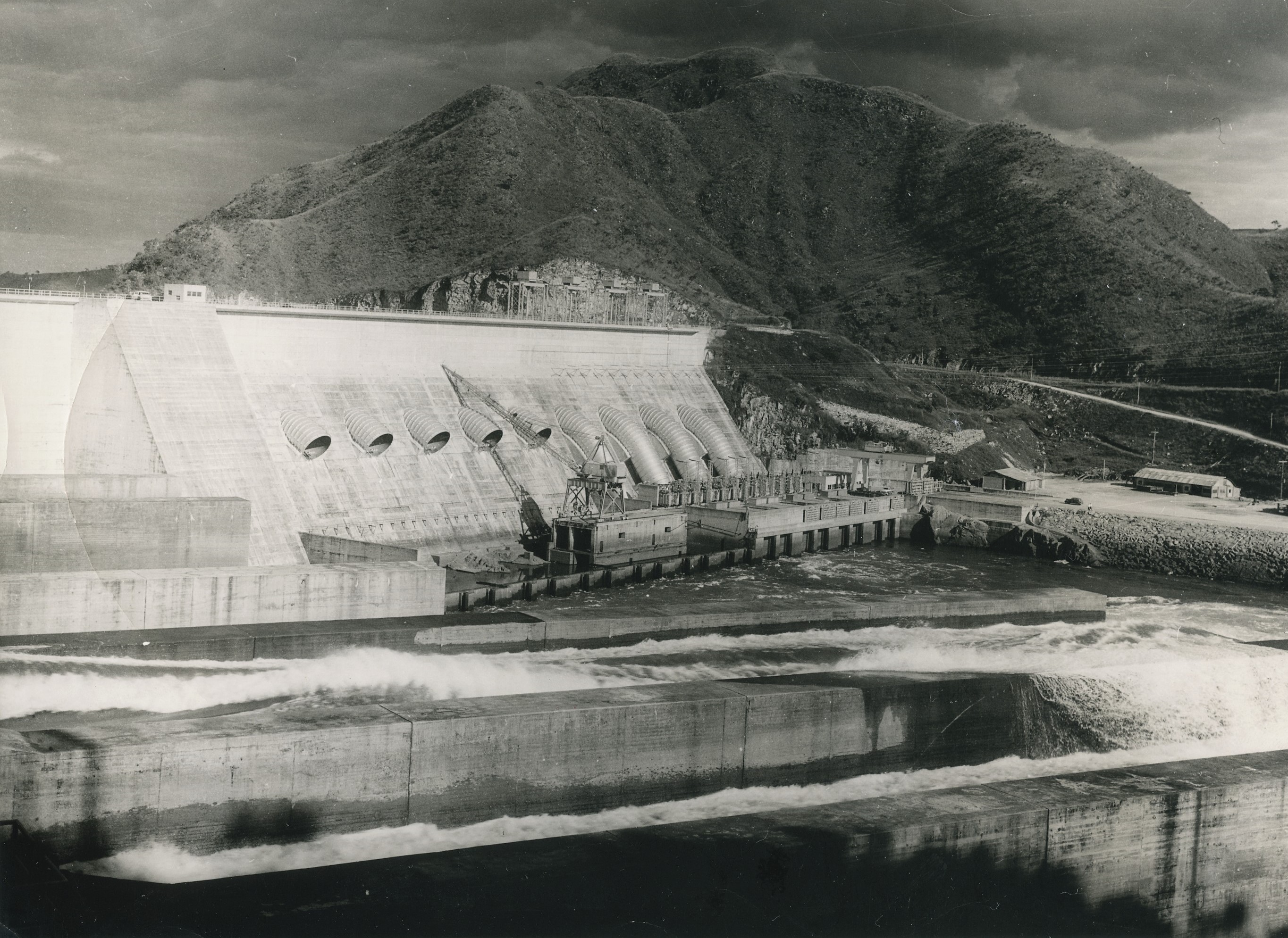 Fotografia do Fundo Correio da Manhã, sob a guarda do Arquivo Nacional.